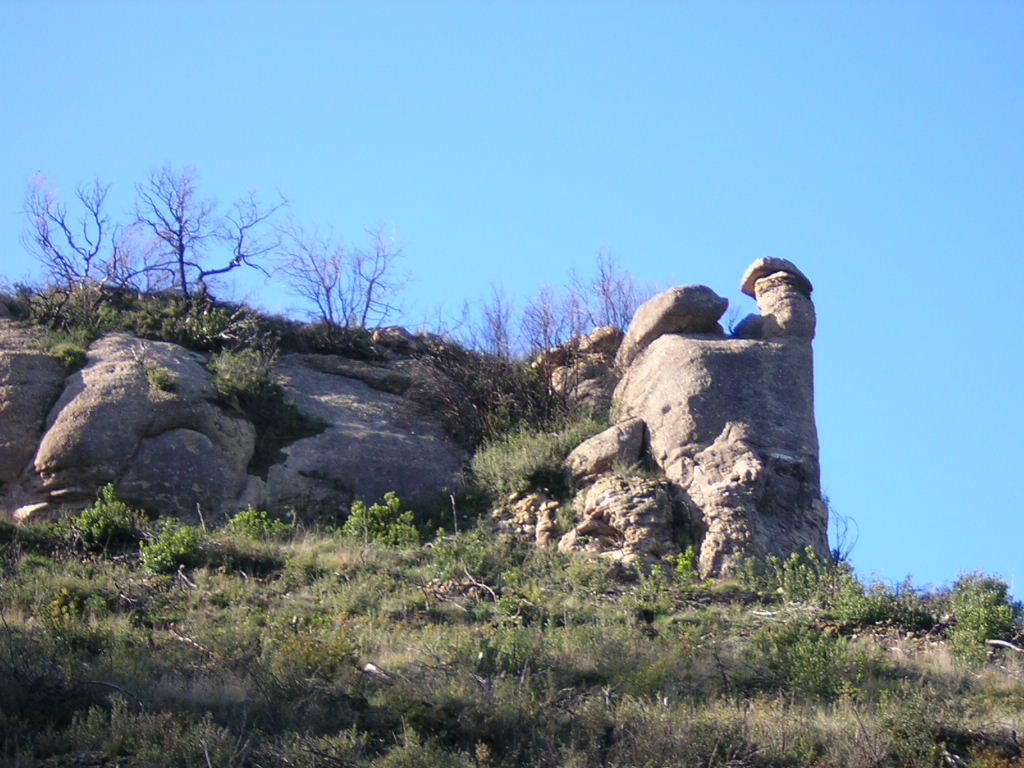 El Codro Barret (Monistrol de Calders, Moianès)